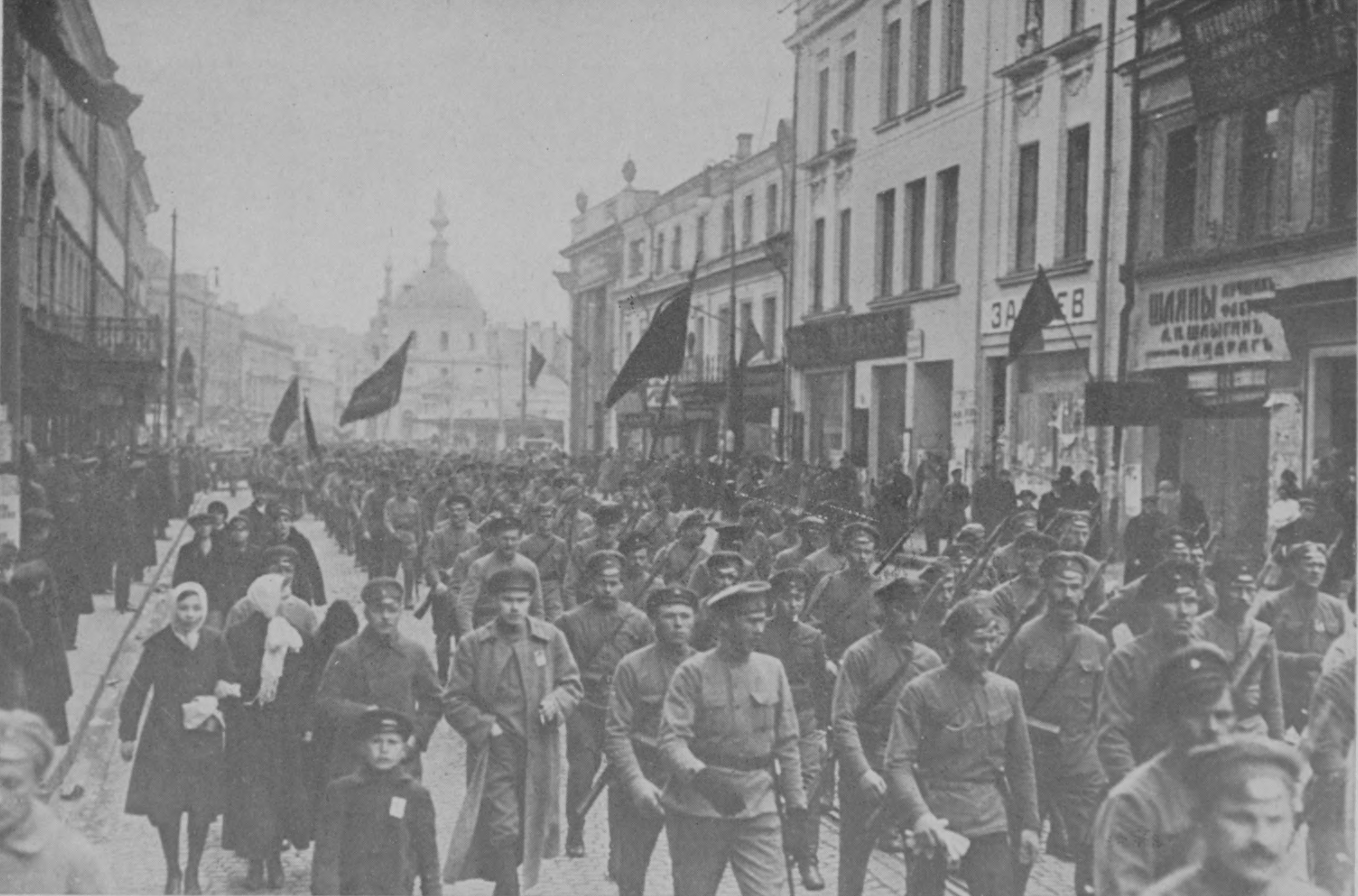 Batallones de tropas favorables a los bolchviques marchan hacia Smolny reclamando el traspaso del poder a los Consejos.